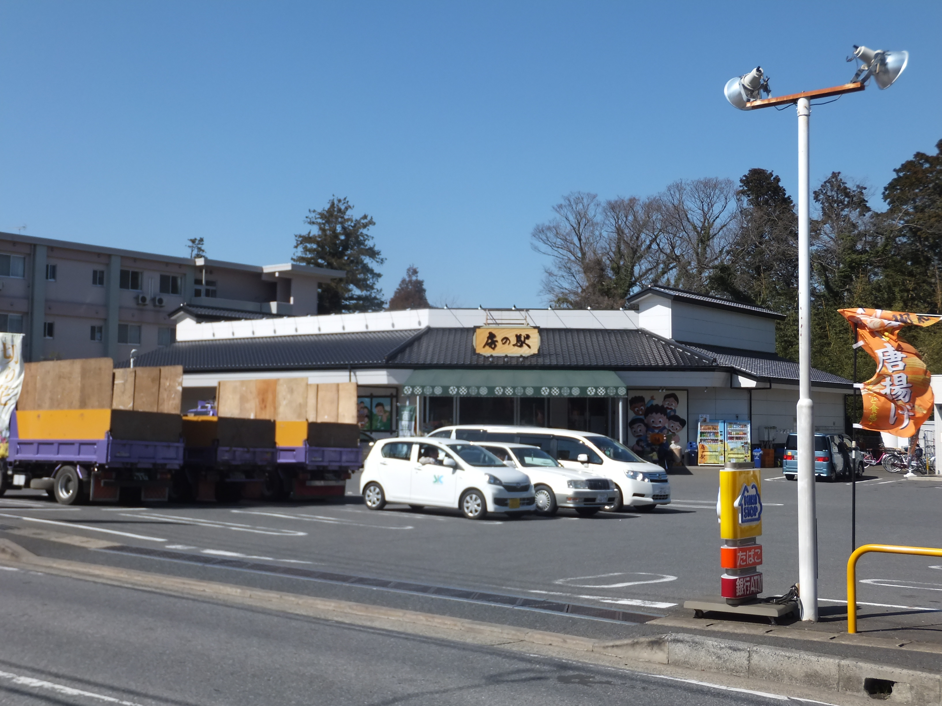 株式会社諏訪商店が運営する千葉県内の物販施設『房の駅』横戸店（千葉市花見川区）